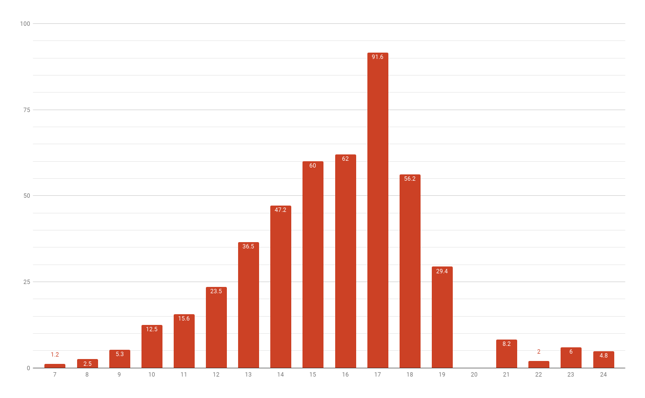 アンゴラ兎毛収毛実績